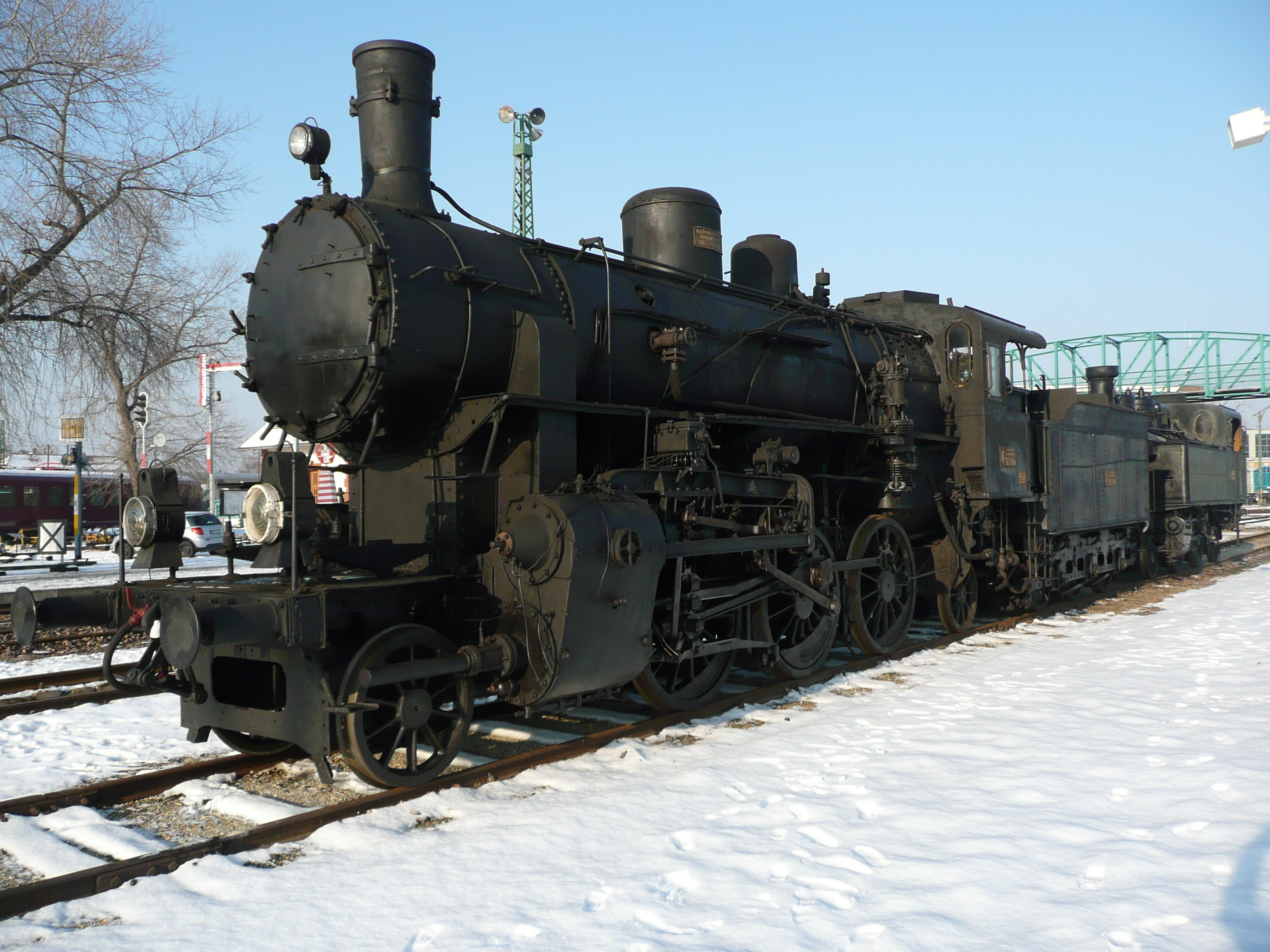 324_540 im Bahnpark Budapest